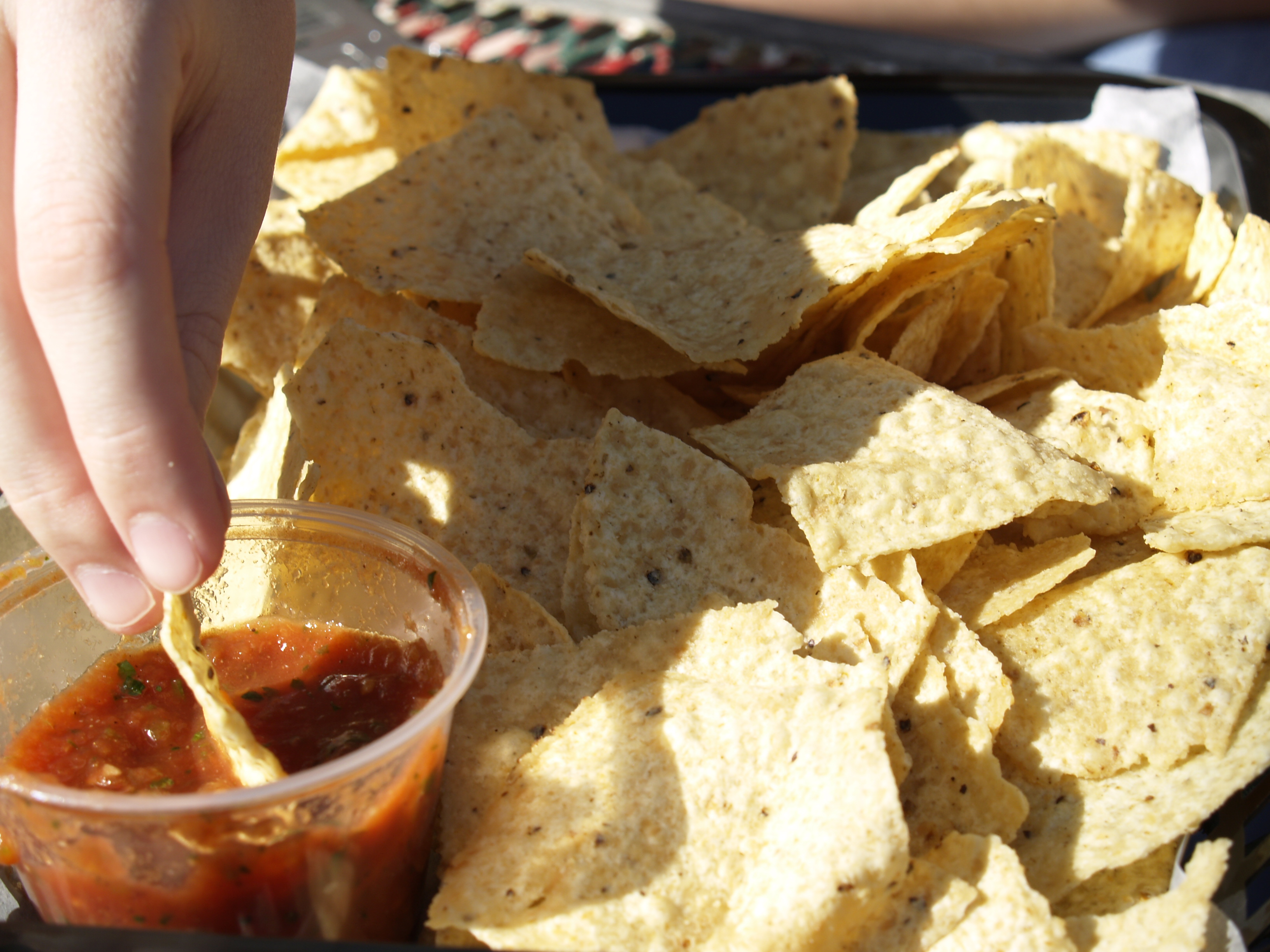 Chips og salsa